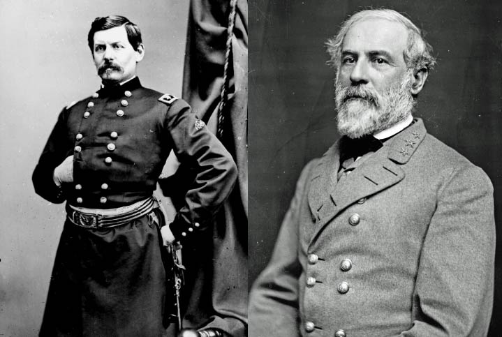 McClellan y Lee